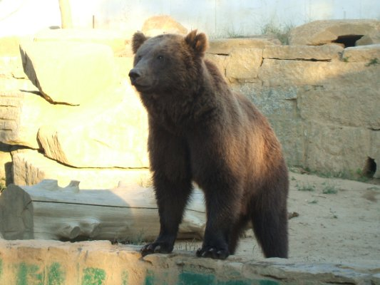 Oso Vigozoo